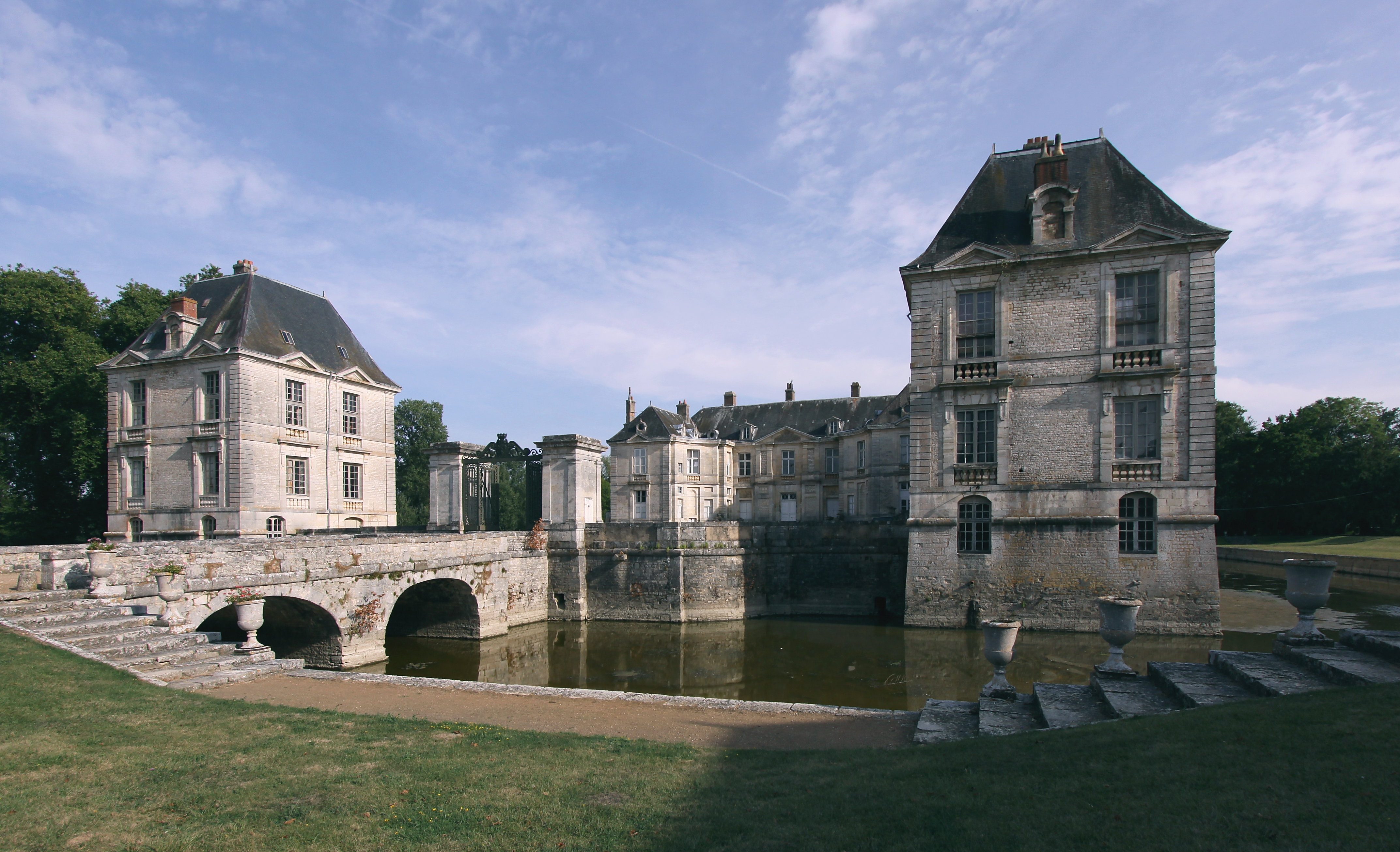 Schloss Lignières in der französischen Gemeinde Lignières im Département Cher - Zufahrt zu Ehrenhof